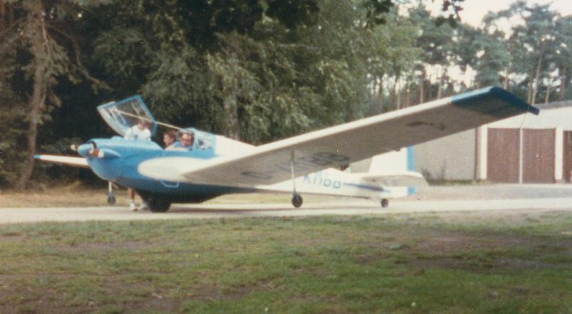 SF 25 D Falke. Picture taken in 1986 at Babenhausen Airfield, Germany (EDEF)